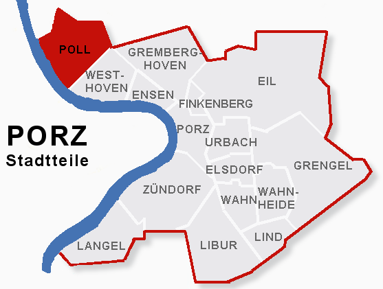 Lage des Stadtteils Poll im Stadtbezik Porz